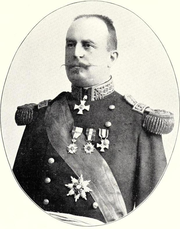 Jorge Boonen Rivera